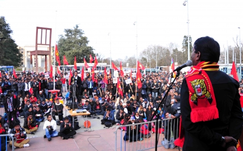 தமிழ் இன அழிப்பிற்கு நீதி கேட்டு சீமான் தலைமையில் ஜநா முன்றலில் திரண்ட மக்கள் வெள்ளம்!